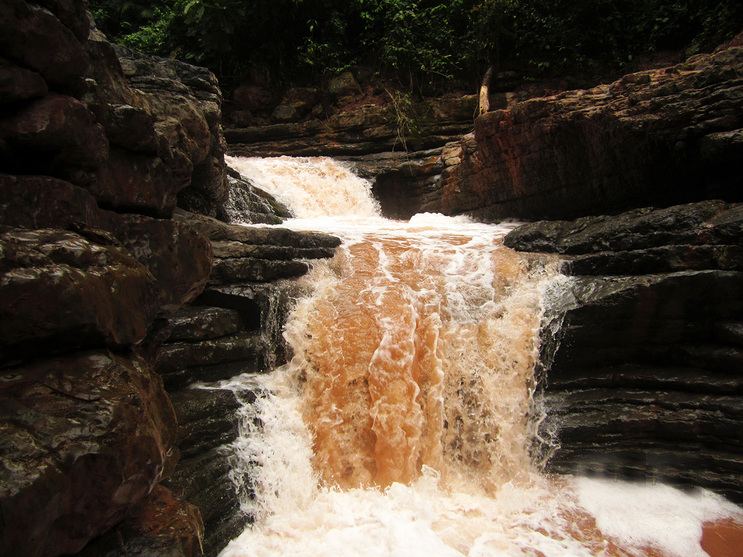 Cascada Escalera 1